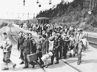 Evakueringsövning i Spånga 1954